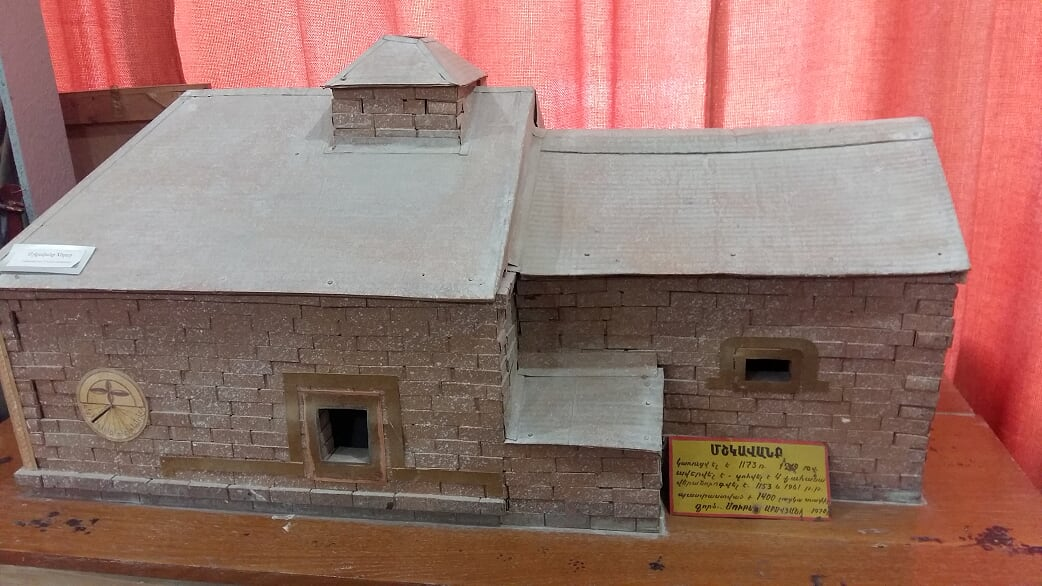 Մշկավանքի մակետ, Կողբի պատմամշակութային նմուշների թանգարան, հեղինակ Սուրեն Աբովյան